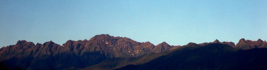 Foto tomada desde la zona verde de la unidad residencial Los Fundadores.